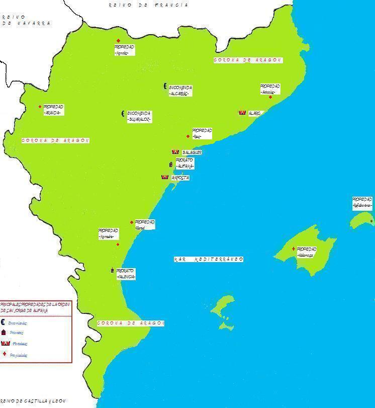 Principales propiedades de la "Orden militar de San Jorge de Alfama", en la Corona de Aragón.